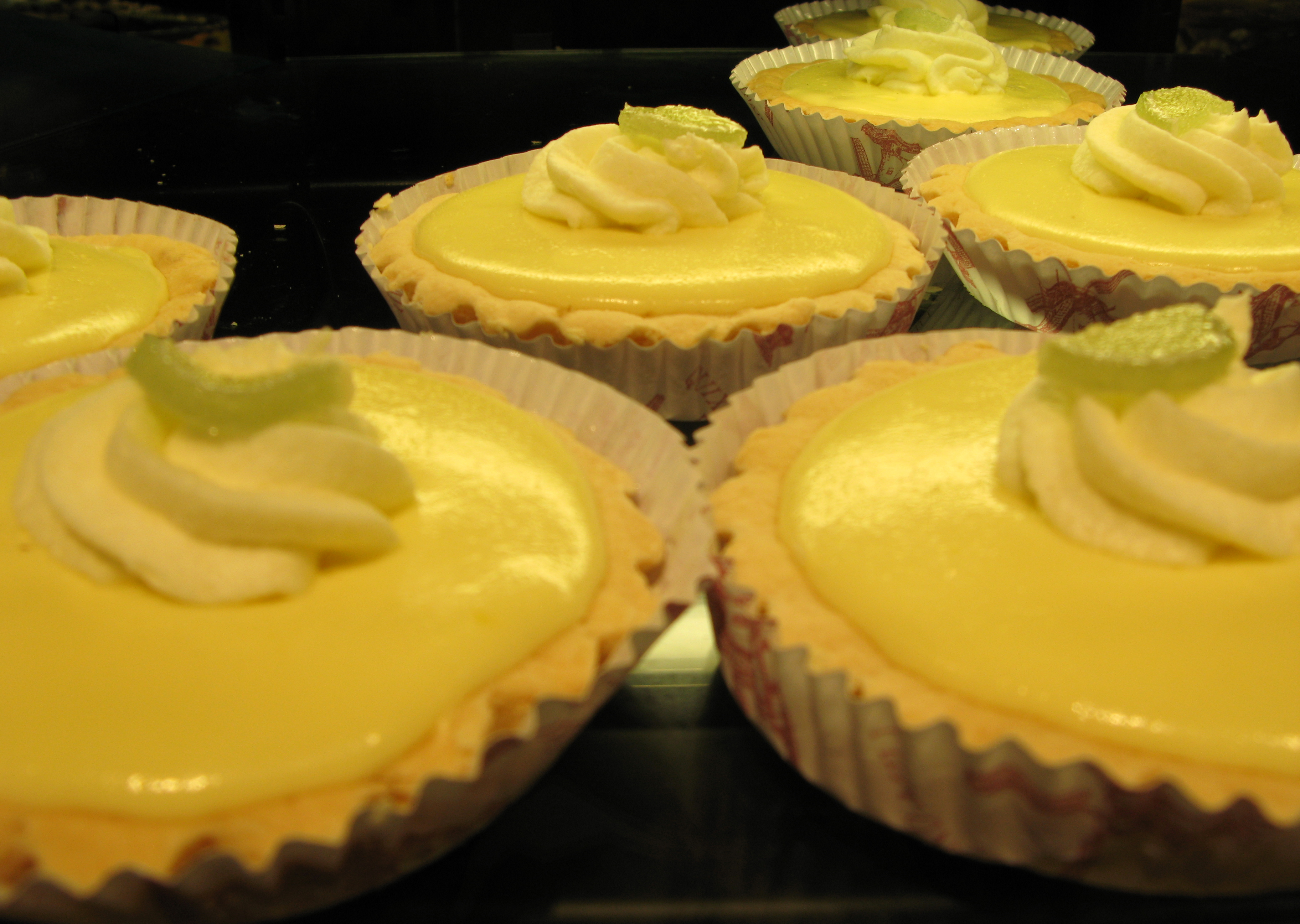 Lemon tarts